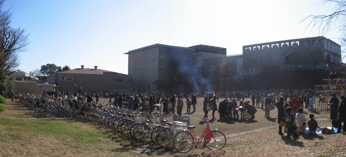 武蔵野市立大野田小学校。右側が校舎、左側は体育館。